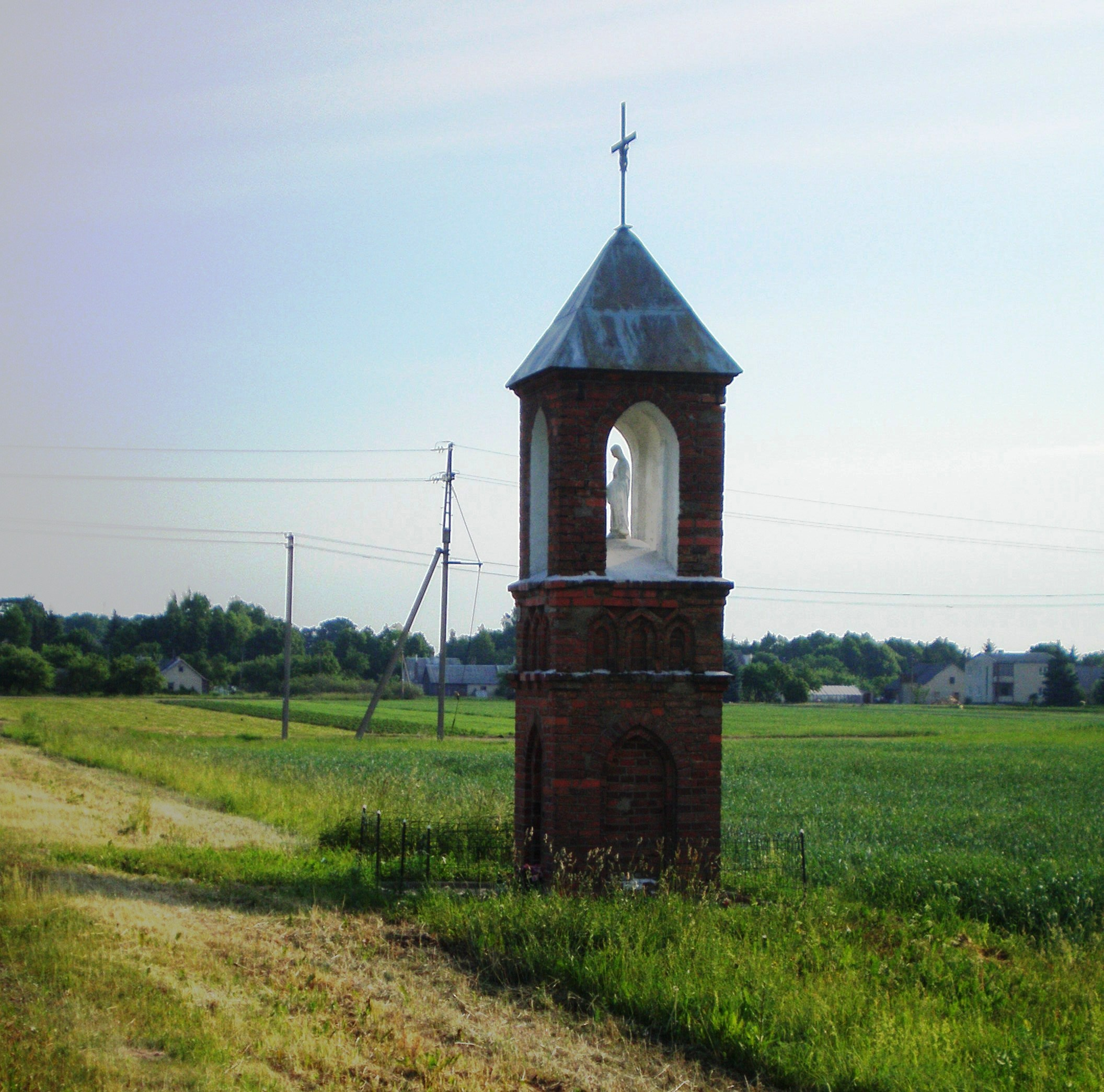 Marijos koplytėlė Surviliškyje